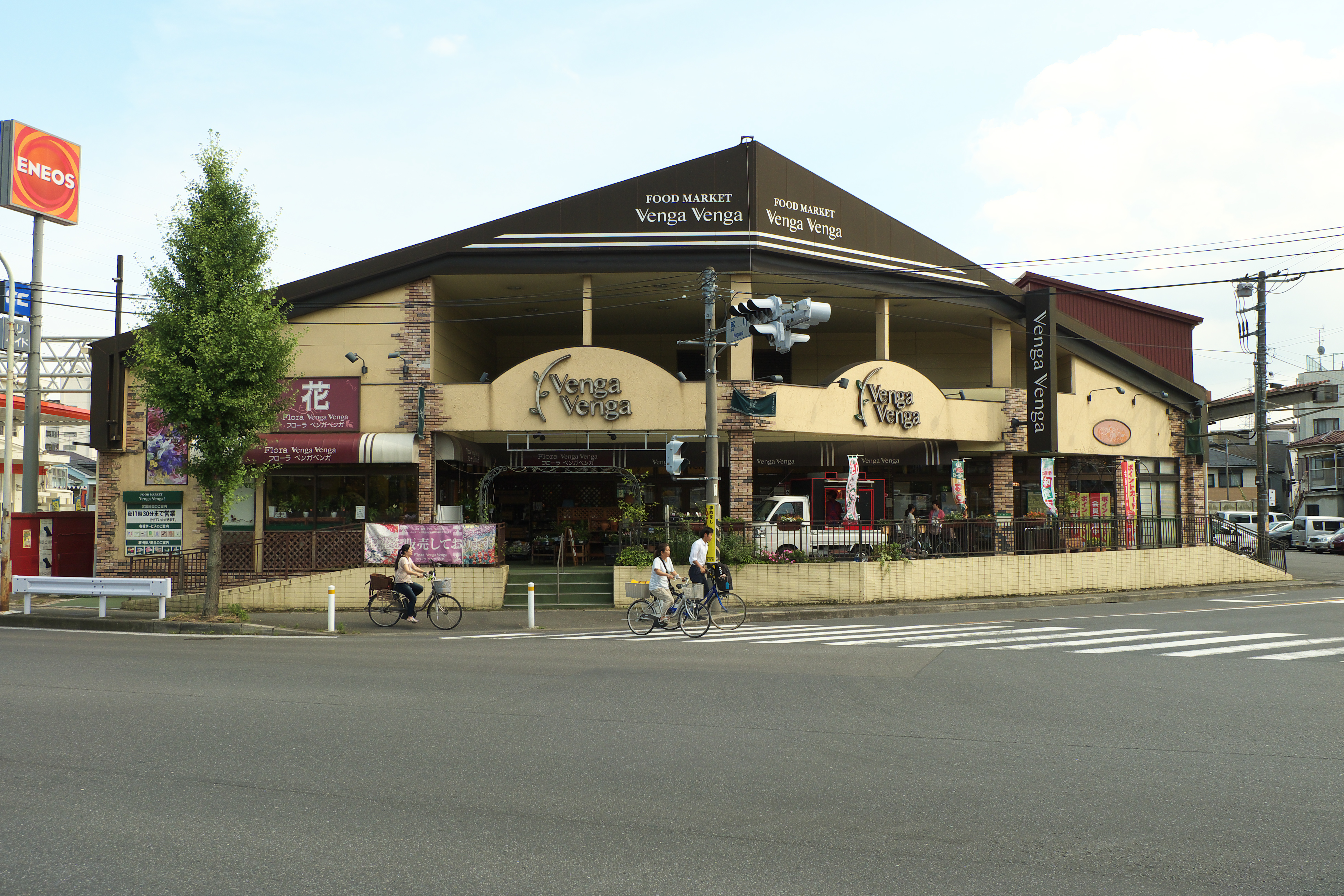 株式会社ナガイが経営するスーパーマーケット「ベンガベンガ」野川店